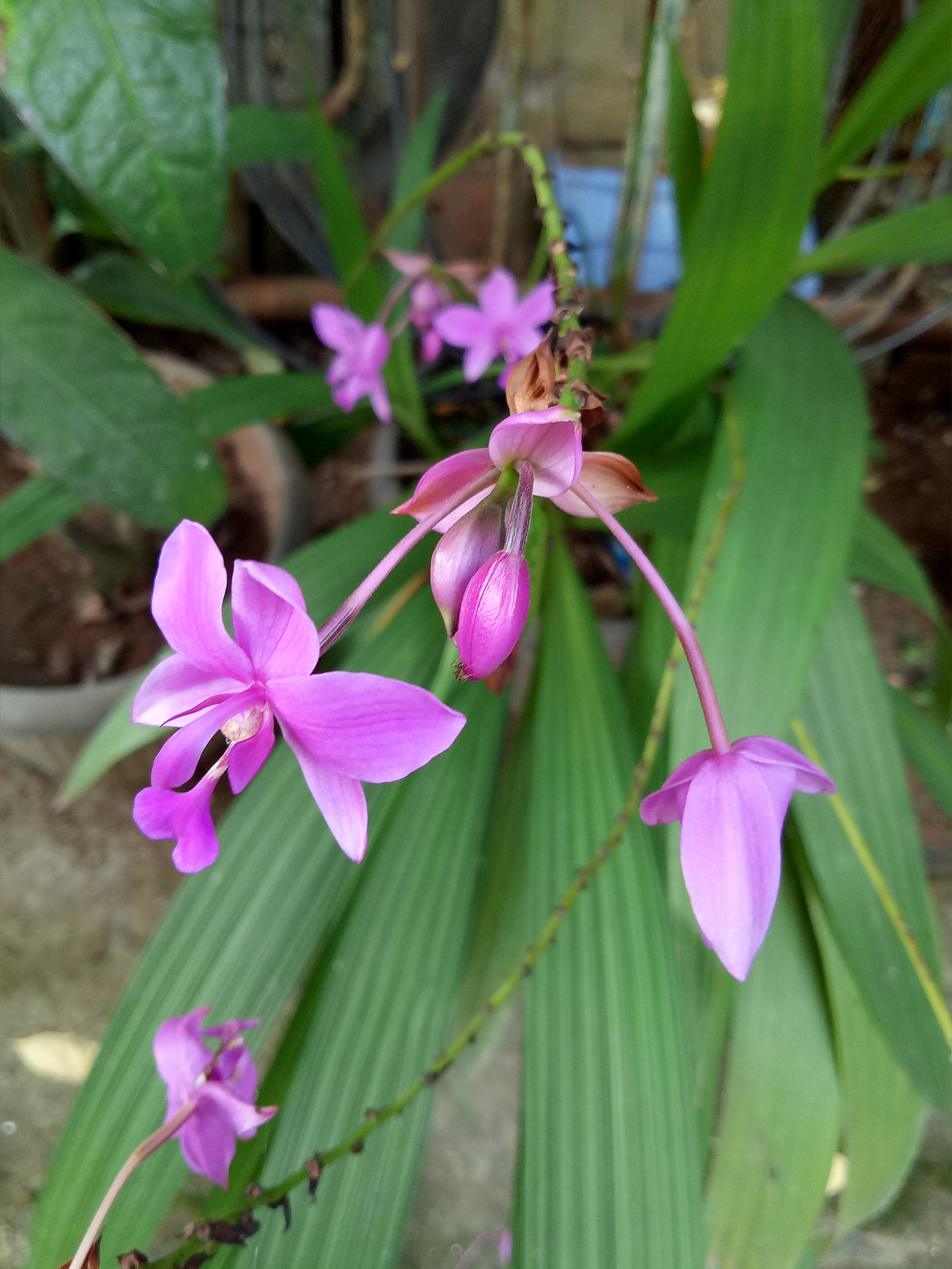 Bunga Anggrek Tanah